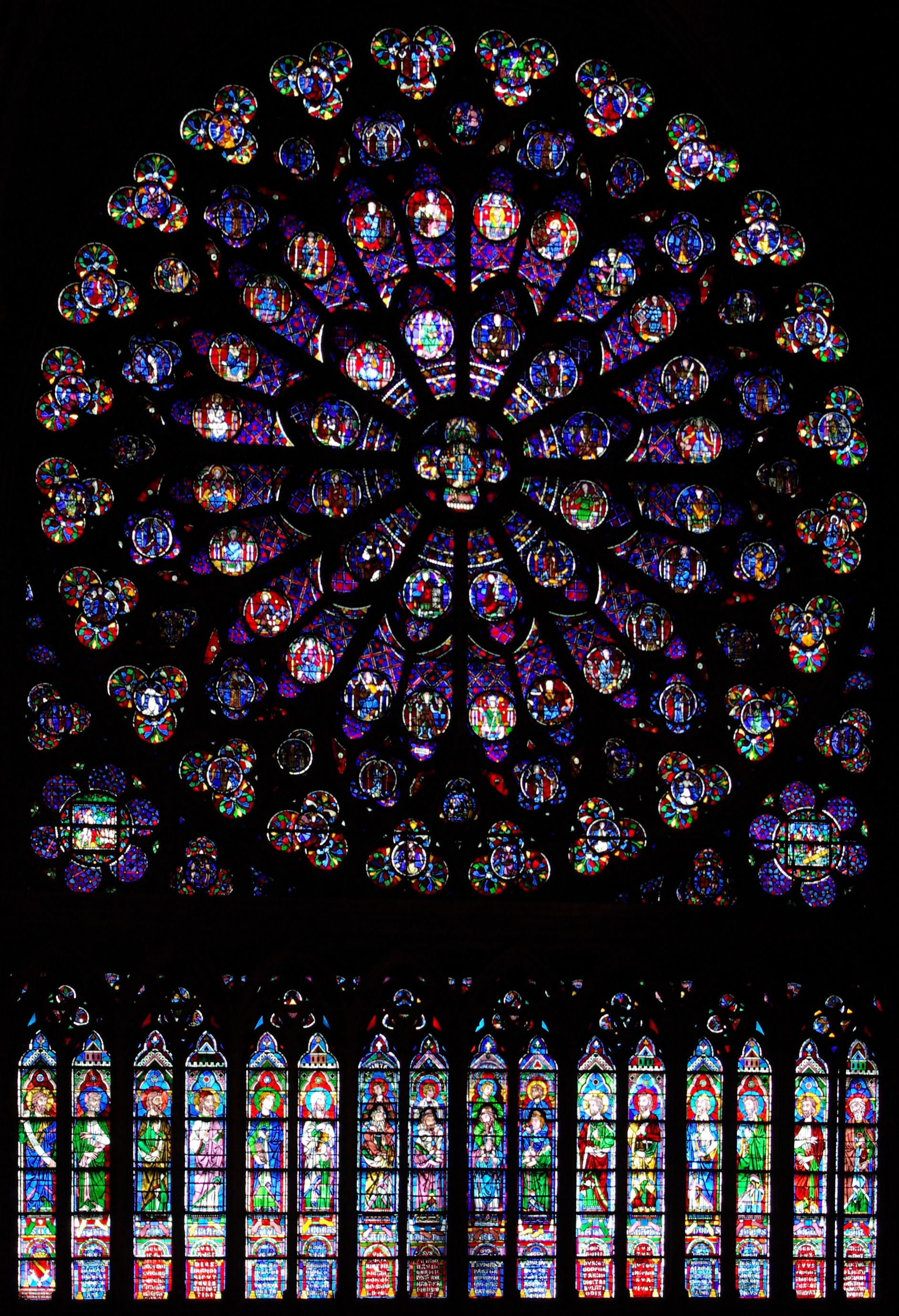 Fensterrose an der Südseite der Kathedrale Notre-Dame de Paris